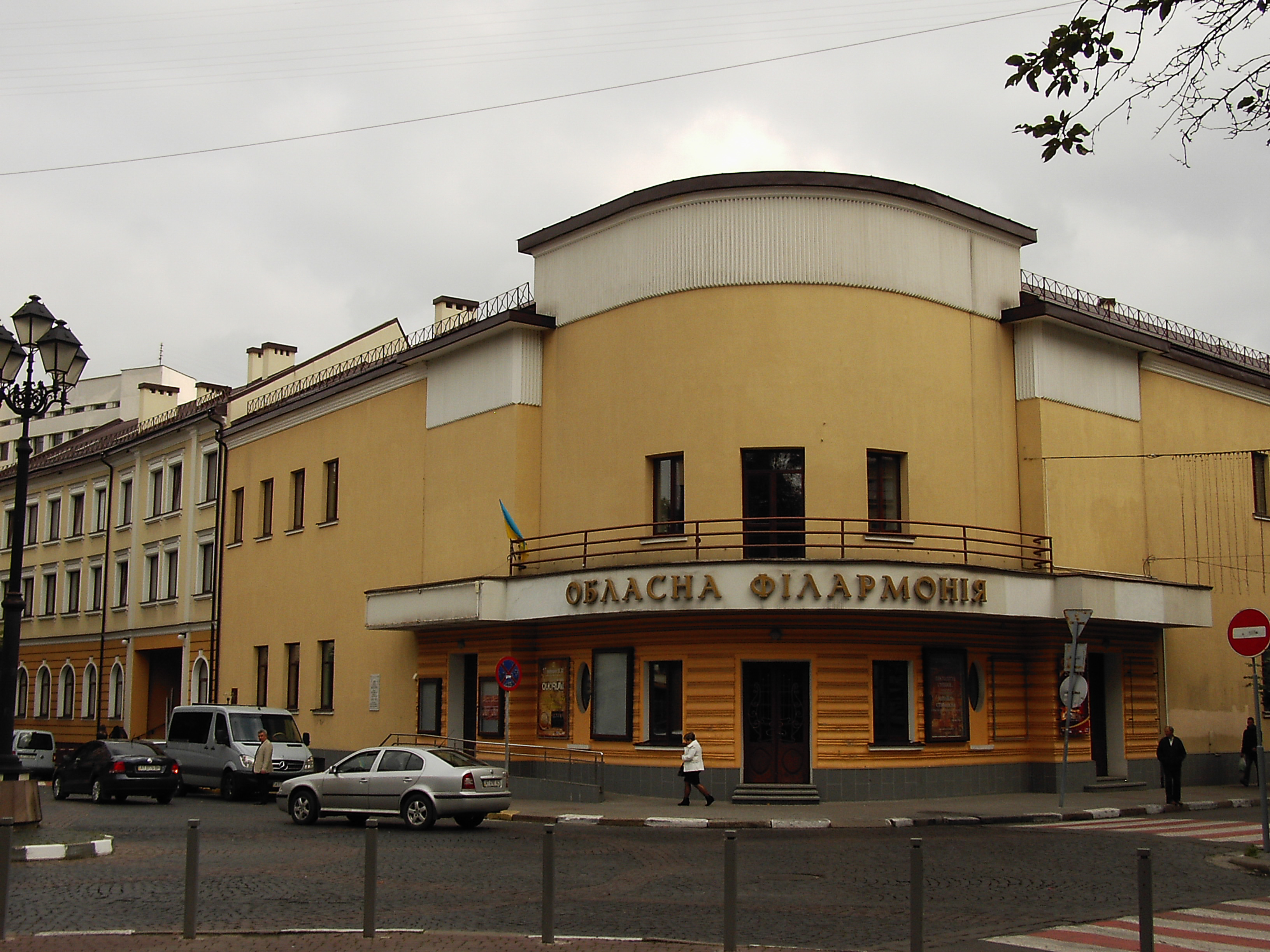 Івано-Франківська обласна філармонія.м.Івано-Франківськ